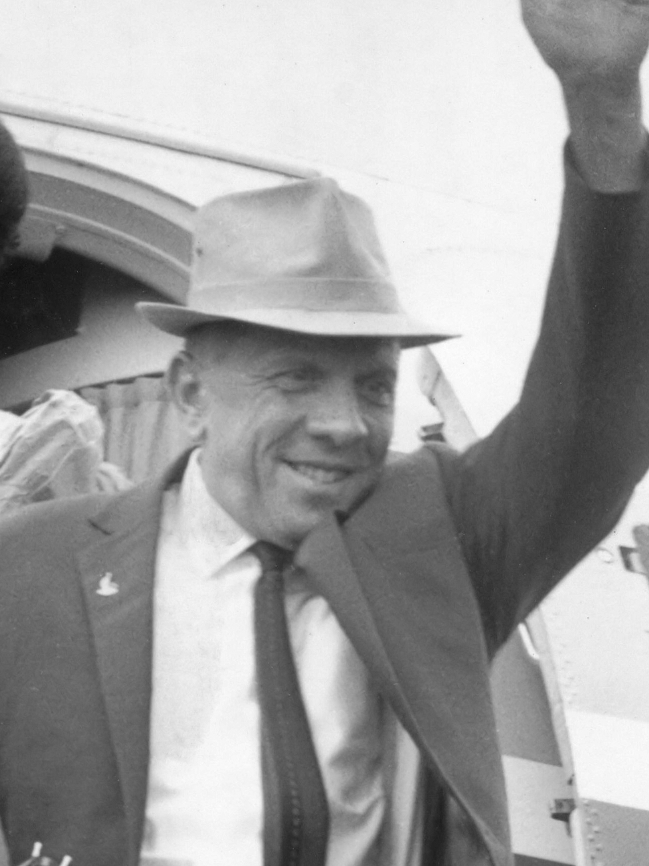 Henk Mohlmann heeft met zijn draaiorgel De Philippine twee maanden door Centraal Amerika getrokken voor liefdadige doeleinden 20 april 1964